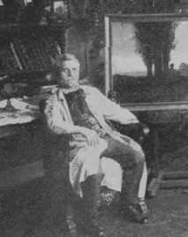 Karel Rašek ve svém atelieru kol. roku 1914